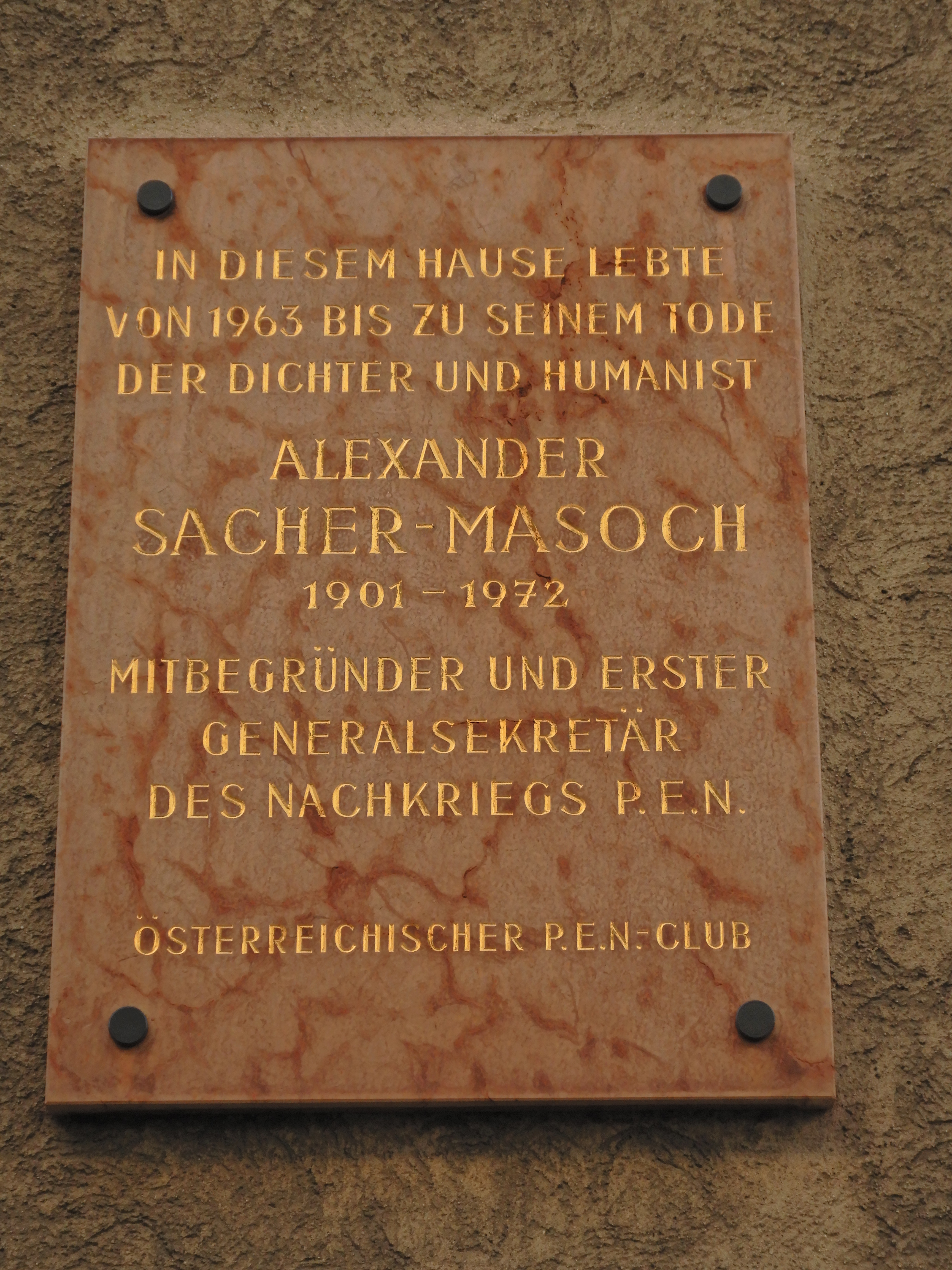 Gedenktafel für Alexander Sacher-Masoch (Wien, Alliogasse 21)